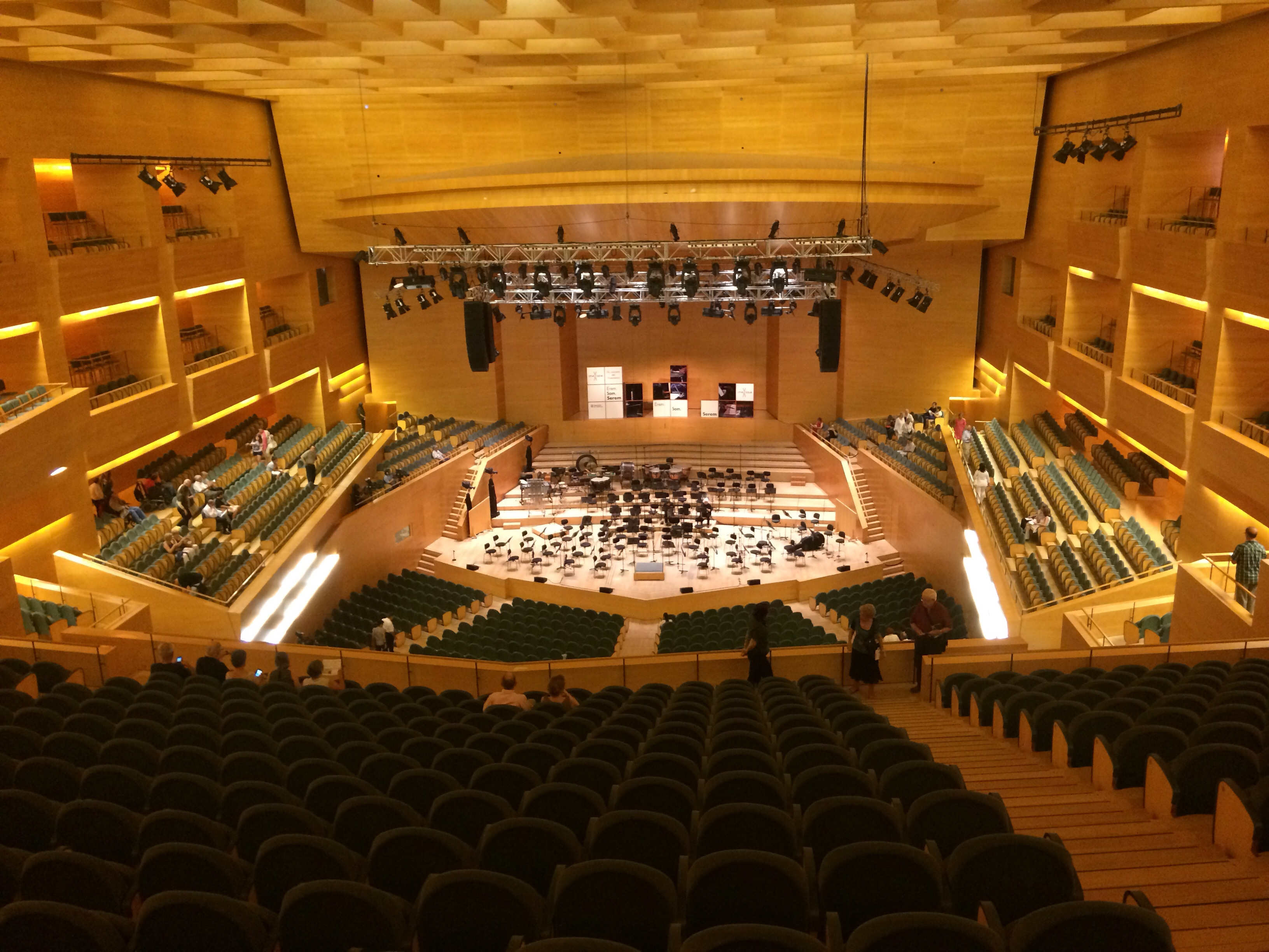 Auditori BCN. Vista panoramica